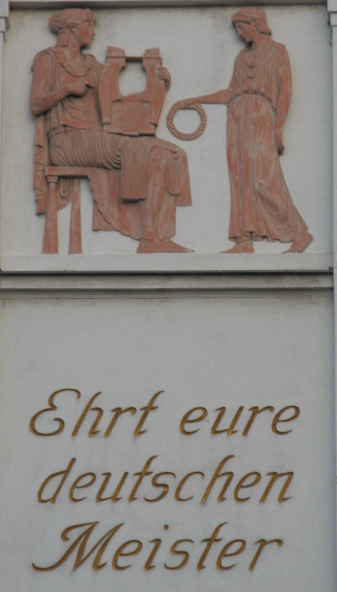 Relief von Ernst Hegenbarth am Wiener Konzerthaus (1912-13)